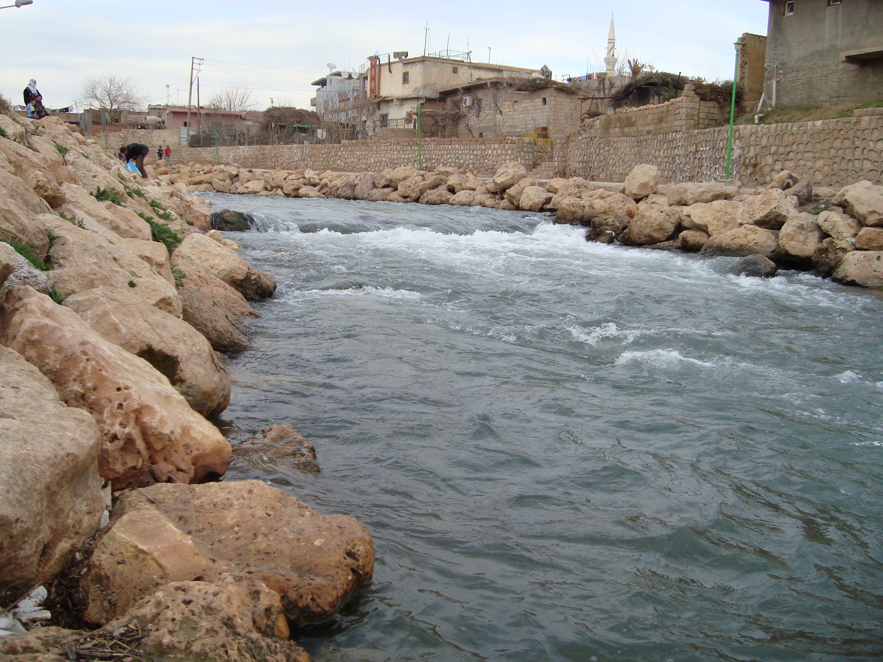 Çağ Çağ deresi, Nusaybin, Musa Anter Parkıdan çekilmiş resmi